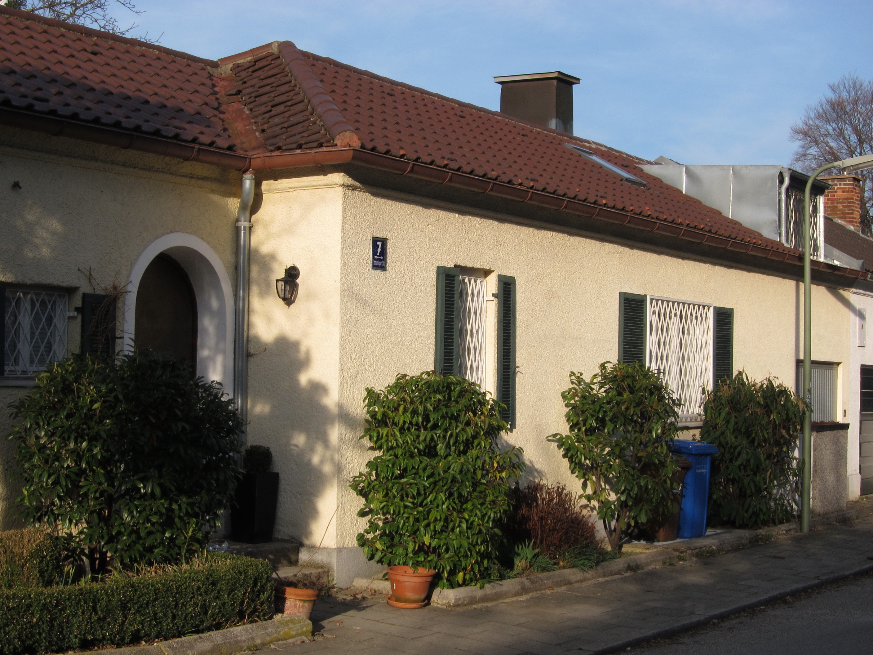 Tittmoninger Straße 1-15 (ungerade); Teilansicht der Atriumsiedlung von Ulrich Seek, vgl. Neufahrner Straße 10-24 (gerade).